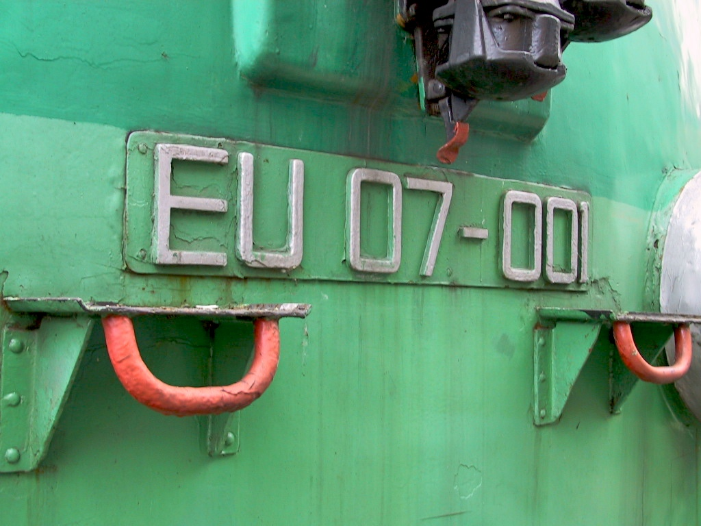 Oznaczenie na czole elektrowozu EU07-001.